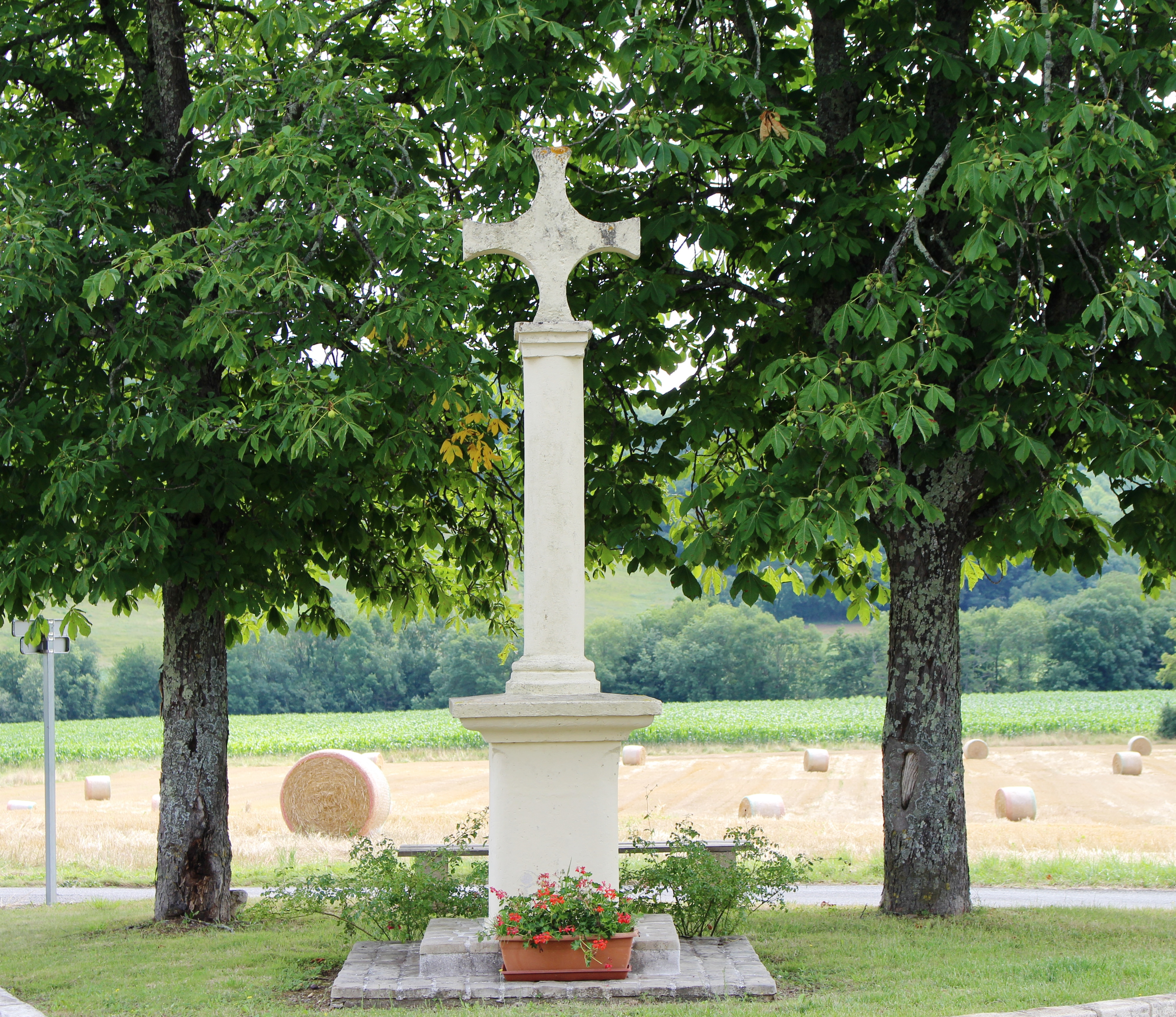 Croix de Devèze (Hautes-Pyrénées)